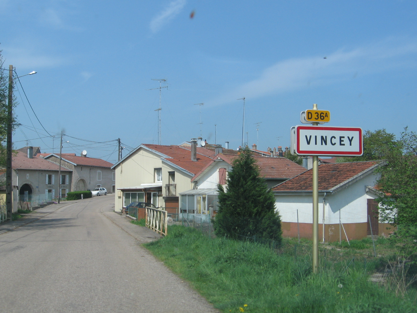 Vincey, may 2006